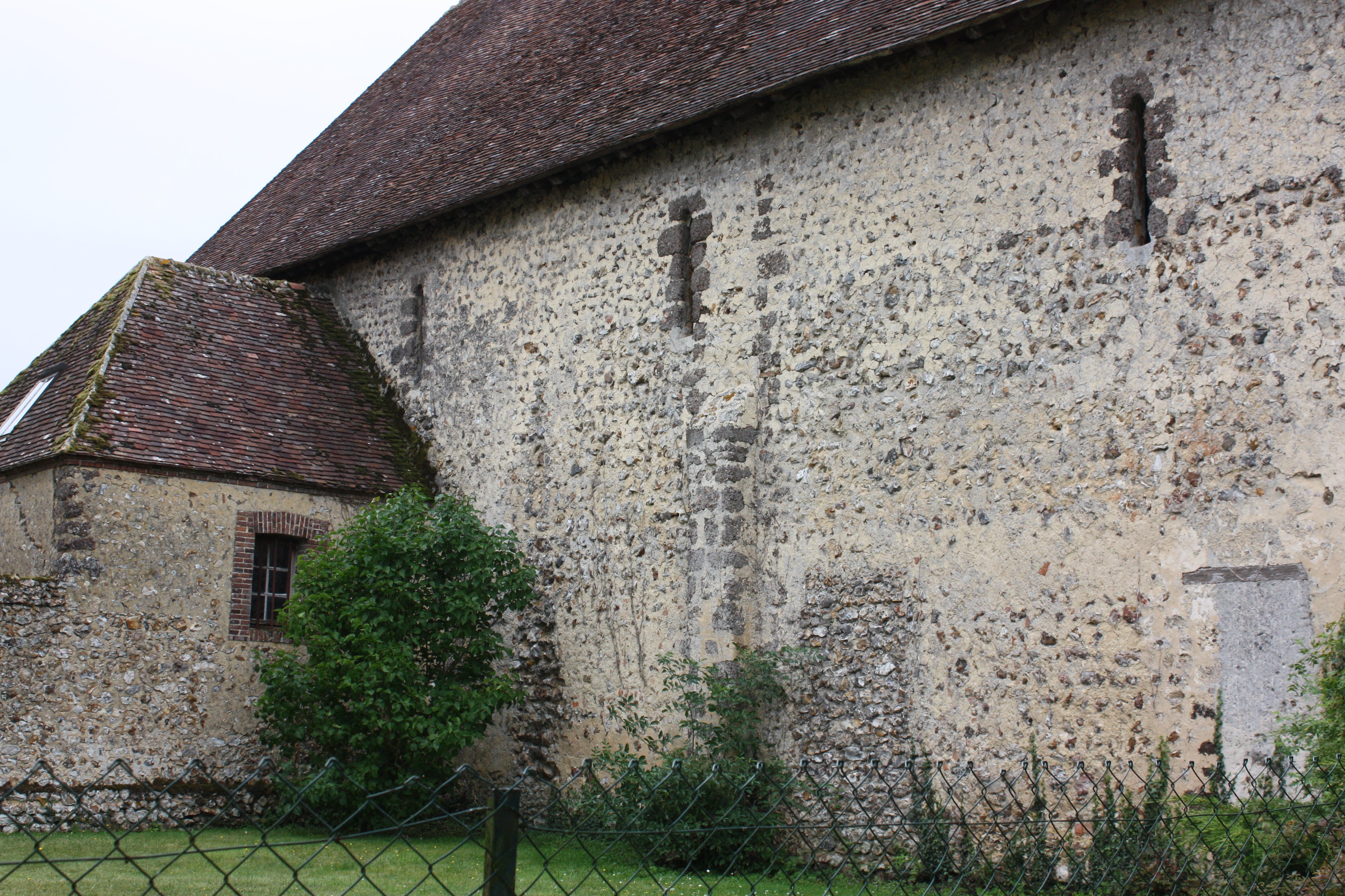 Morvilliers - Eglise Saint-Denis Mur Nord